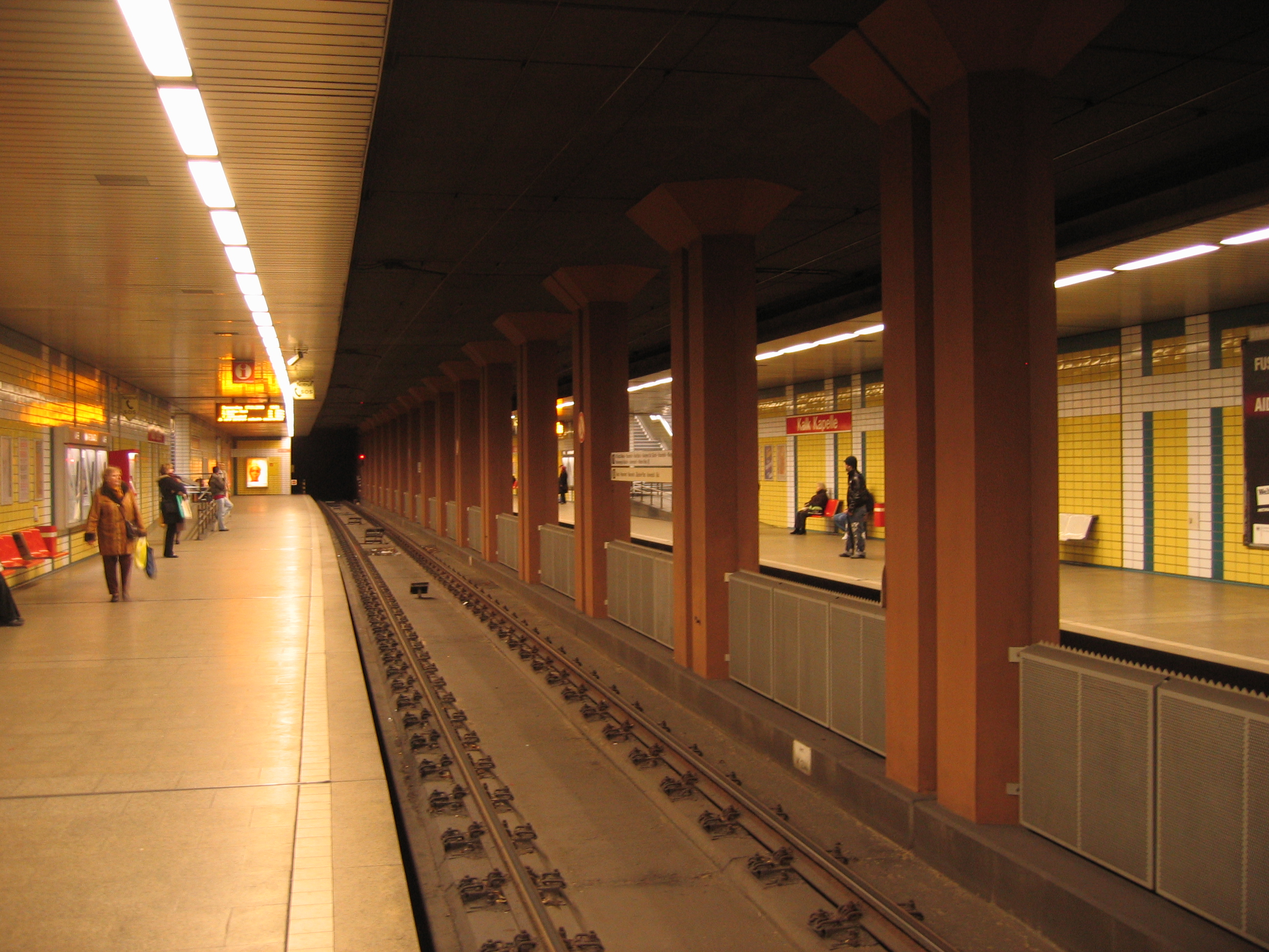 U-Bahn-Station Kalk Kapelle der Stadtbahn Köln